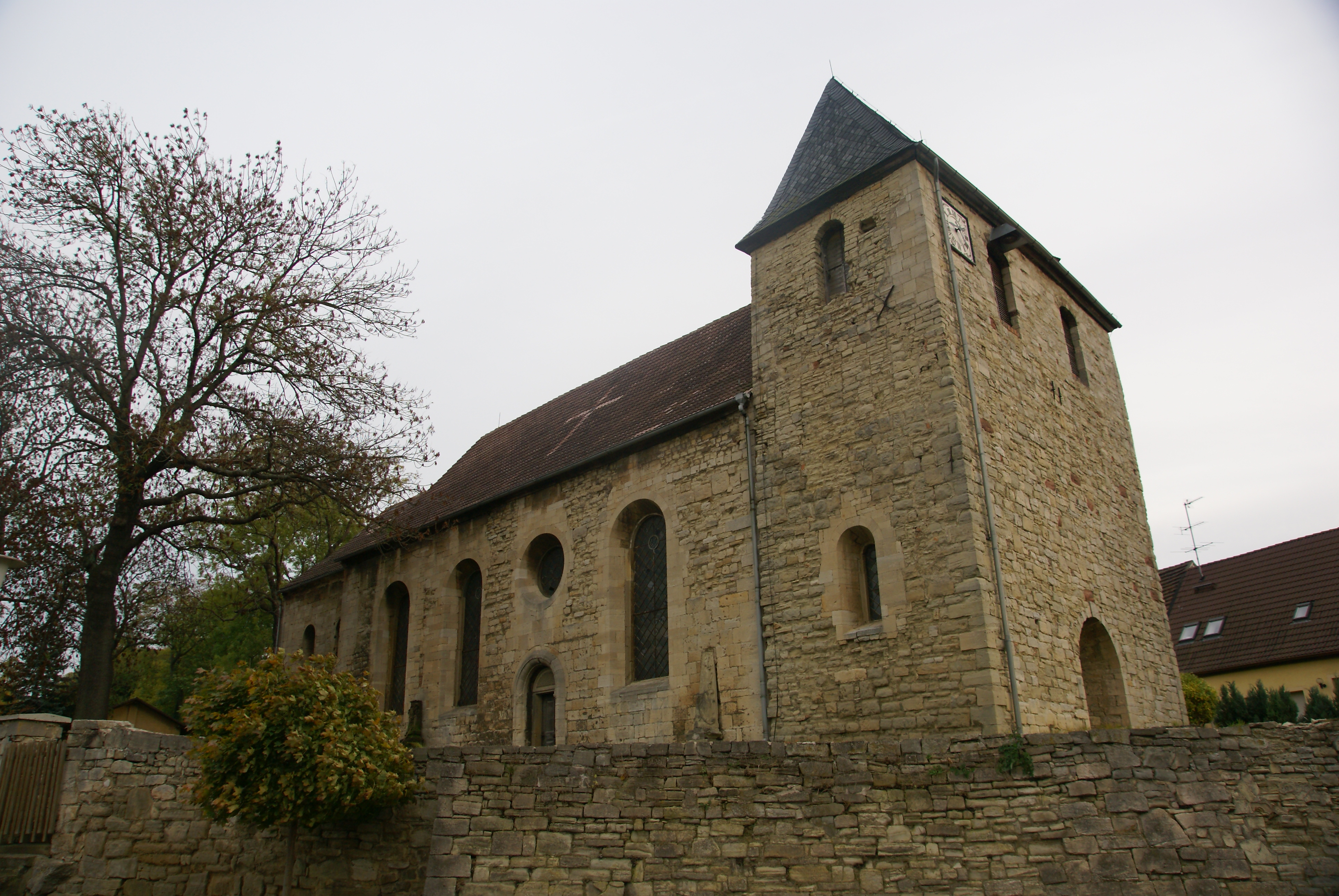 Die Kirche St. Johannes in Schraplau, Saalekreis